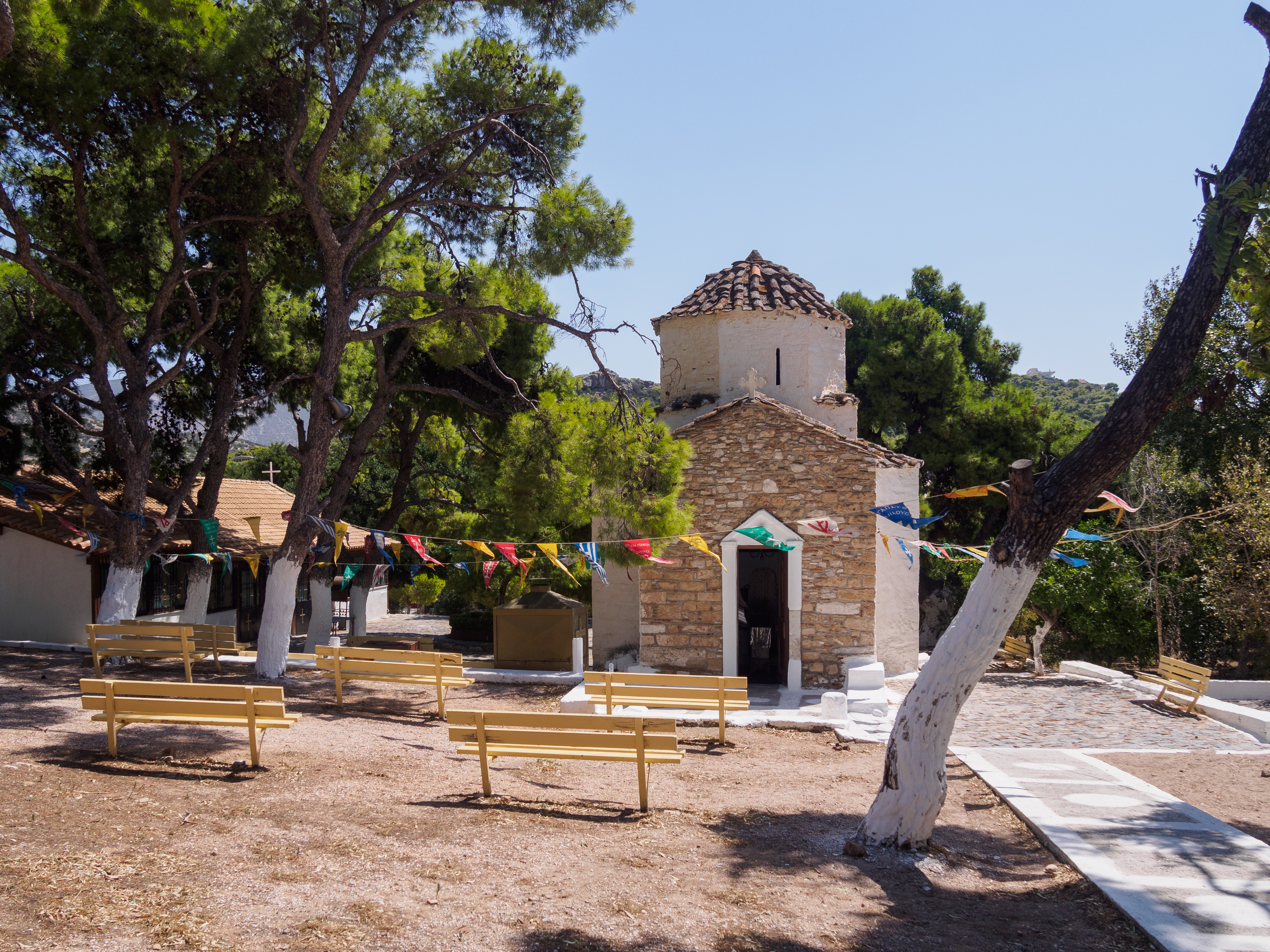 Ναός Αγίου Δημητρίου Σαρωνικού - ο περιβάλλον χώρος«Ναός Αγίου Δημητρίου Σαρωνικού»